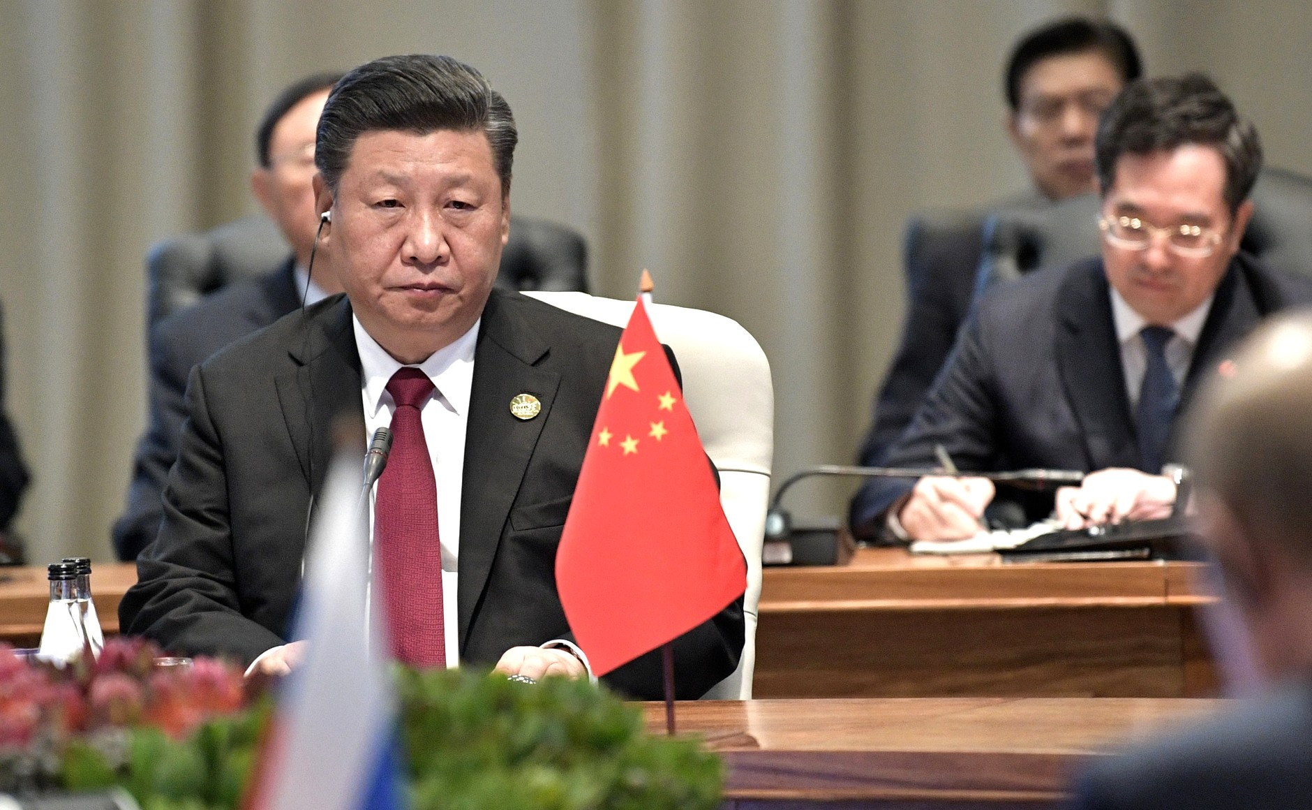 Председатель КНР Си Цзиньпин на заседании саммита БРИКС в узком составе.